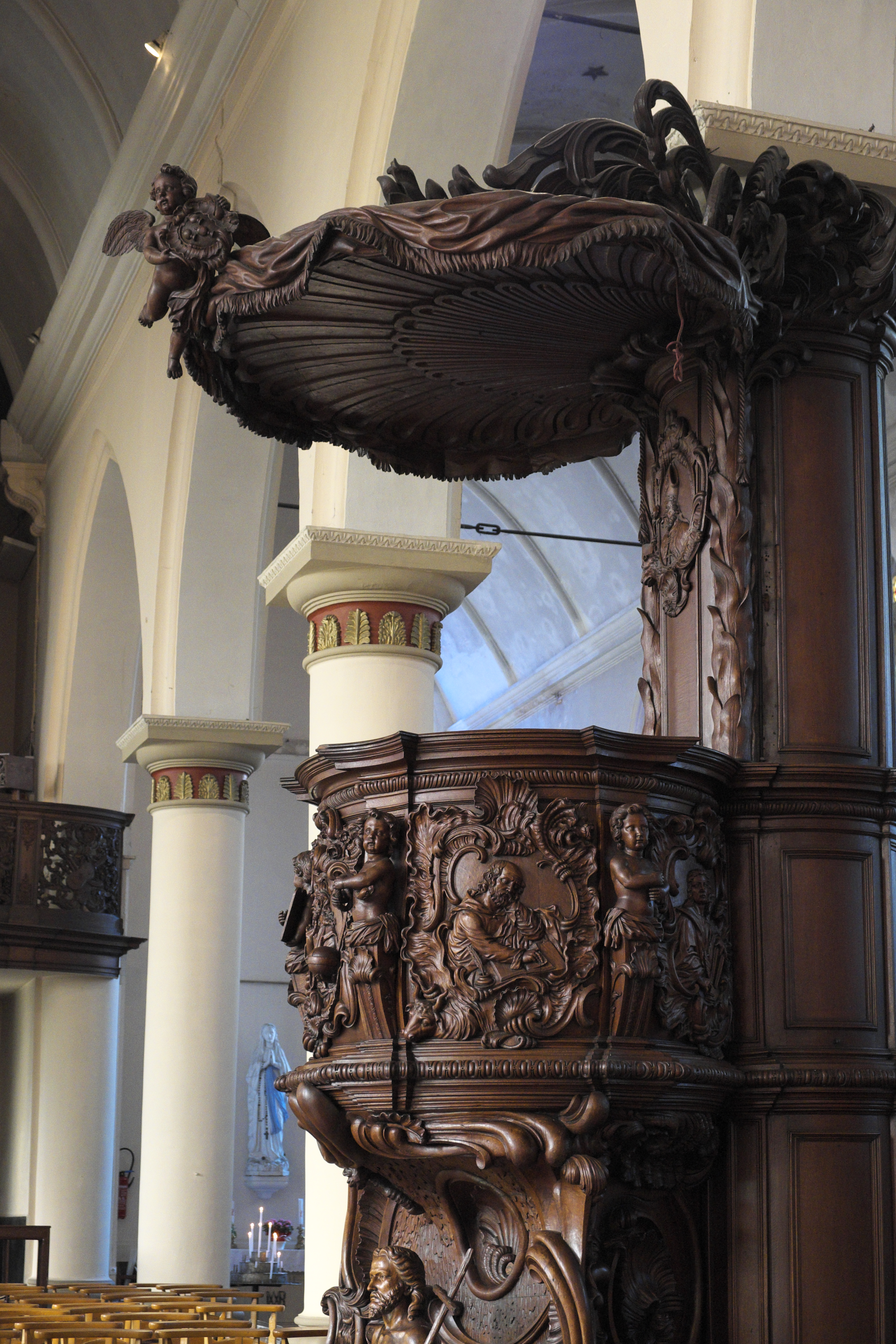 Kirche Saint-Vaast in Hondschoote im Département Nord (Hauts-de-France/Frankreich), Kanzel